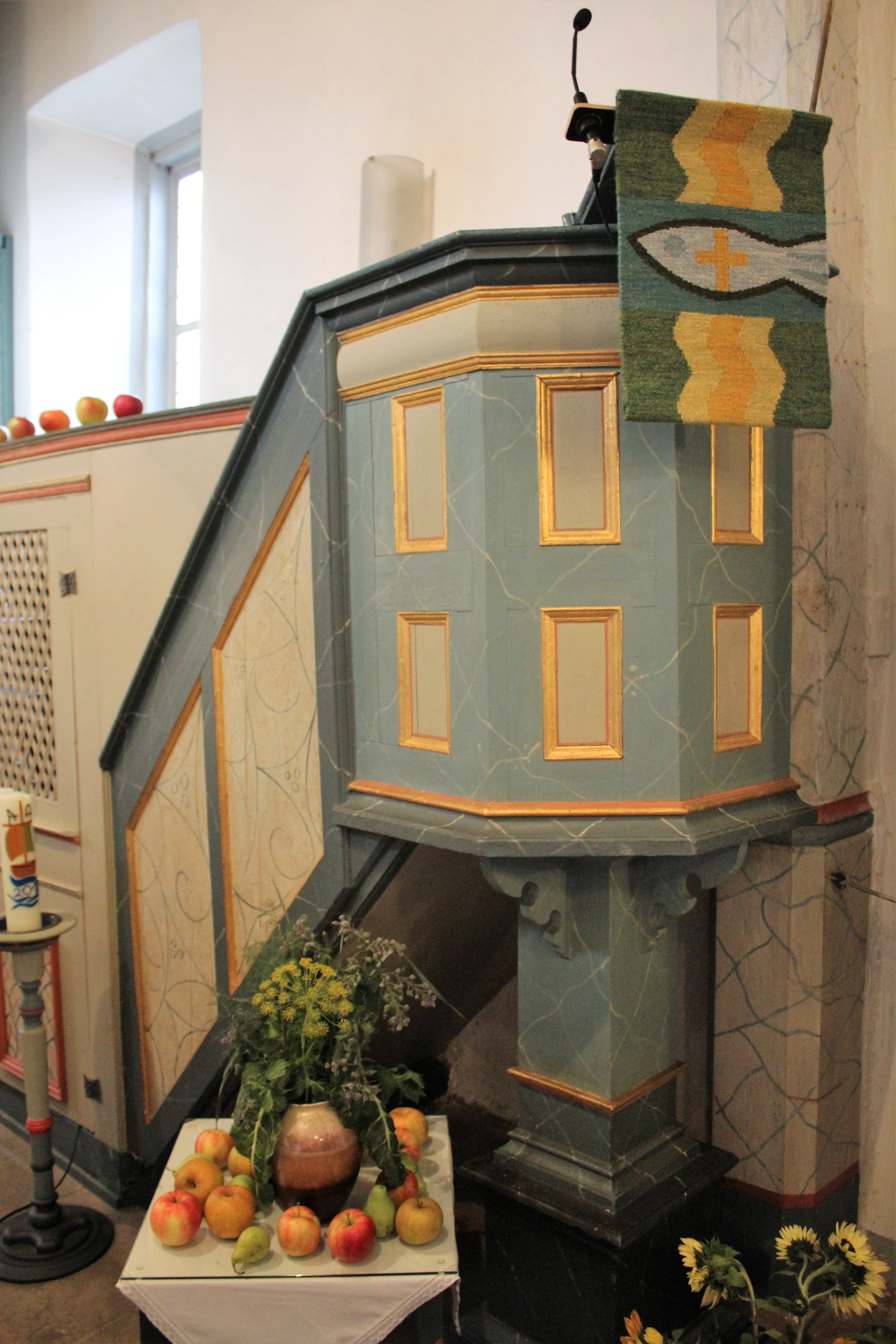 Evangelische Kirche Blasbach, Wetzlar, Lahndillkreis, Hessen, Deutschland